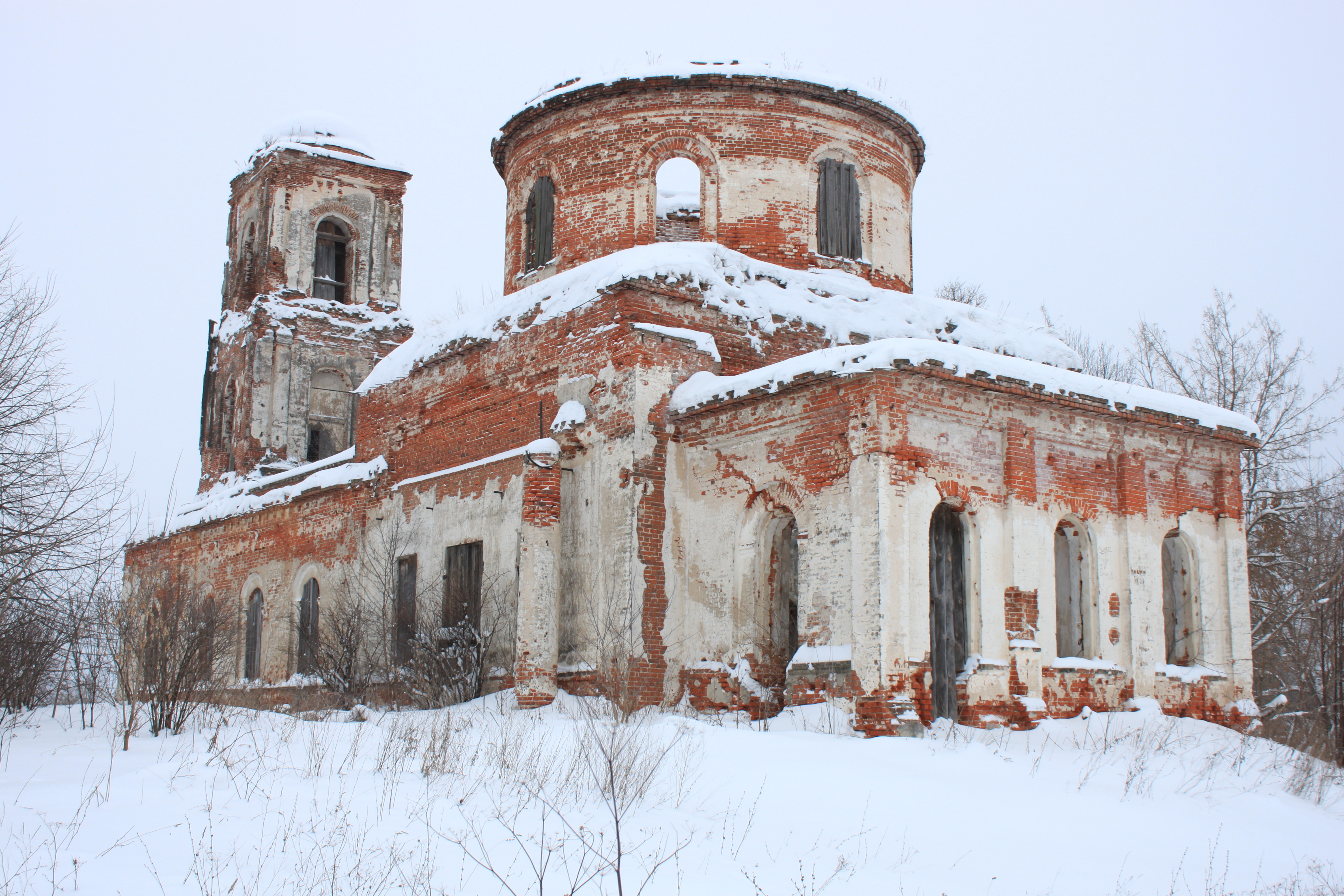 Никольская церковь, 1836 г.